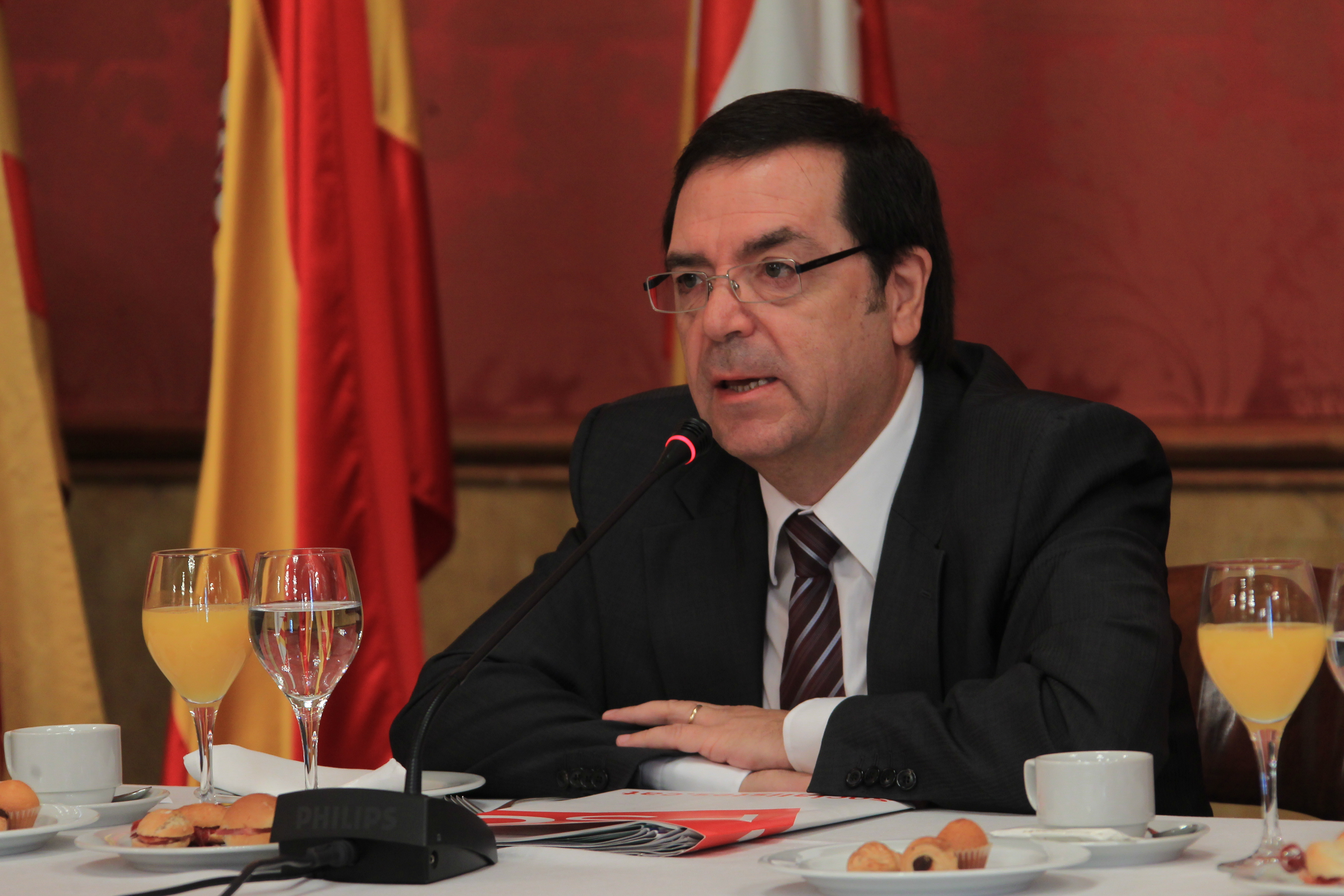 Participació de Joan Rangel, número tres de la candidatura del PSC per a les eleccions generals, en un esmorzar-col·loqui amb empresaris catalans.